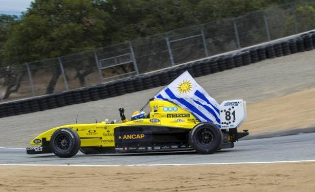 Santiago Urrutia mientras se consagraba campeón de Pro Mazda en 2015